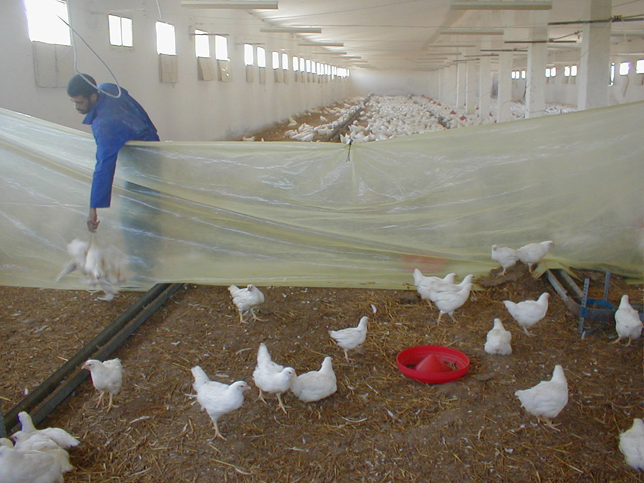 Walon: relijhaedje des poyetes dins ene poytreye